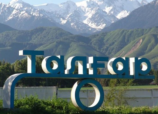 Въезд в город Талгар со стороны Алма-Аты